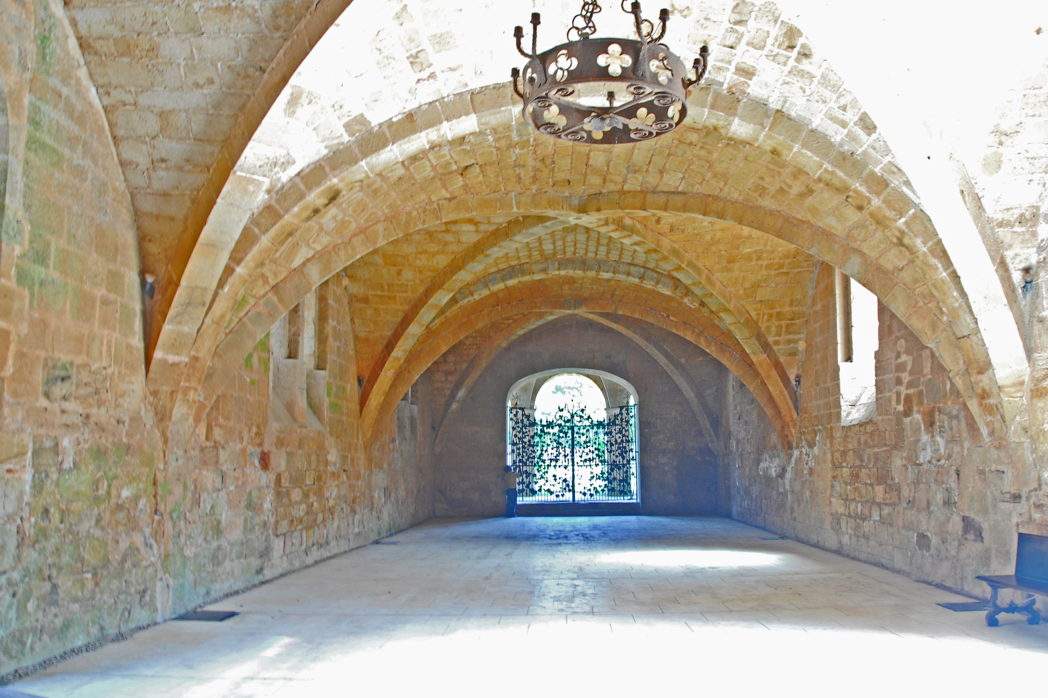 Abbaye de Fontfroide, Refektorium der Laienbrüder